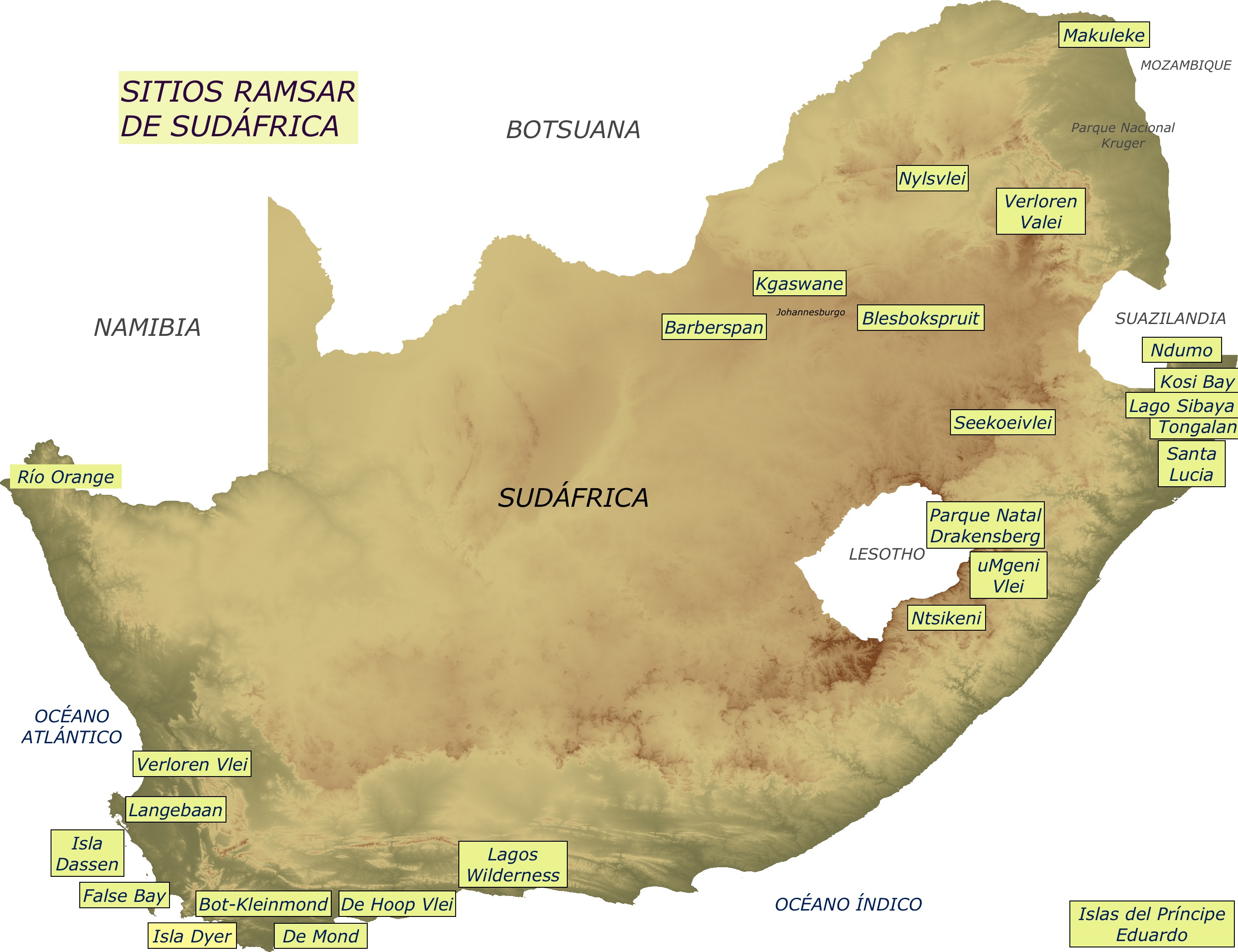 Localización aproximada de los sitios Ramsar de Sudáfrica